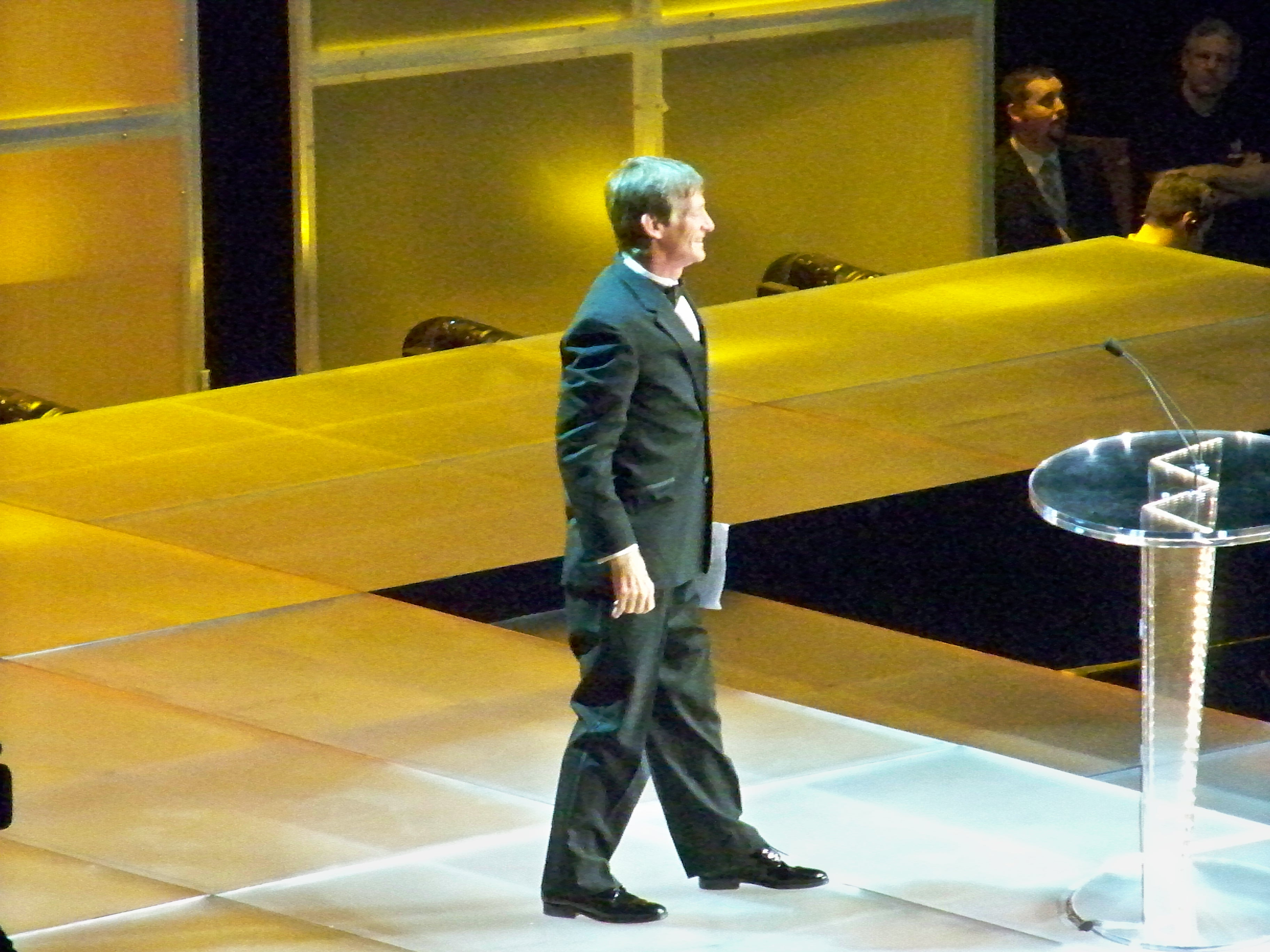 Tres émotionnel comme discours